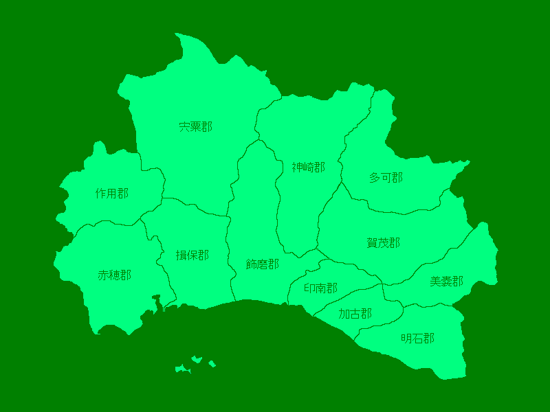 播磨国の各郡のおおまかな地図。